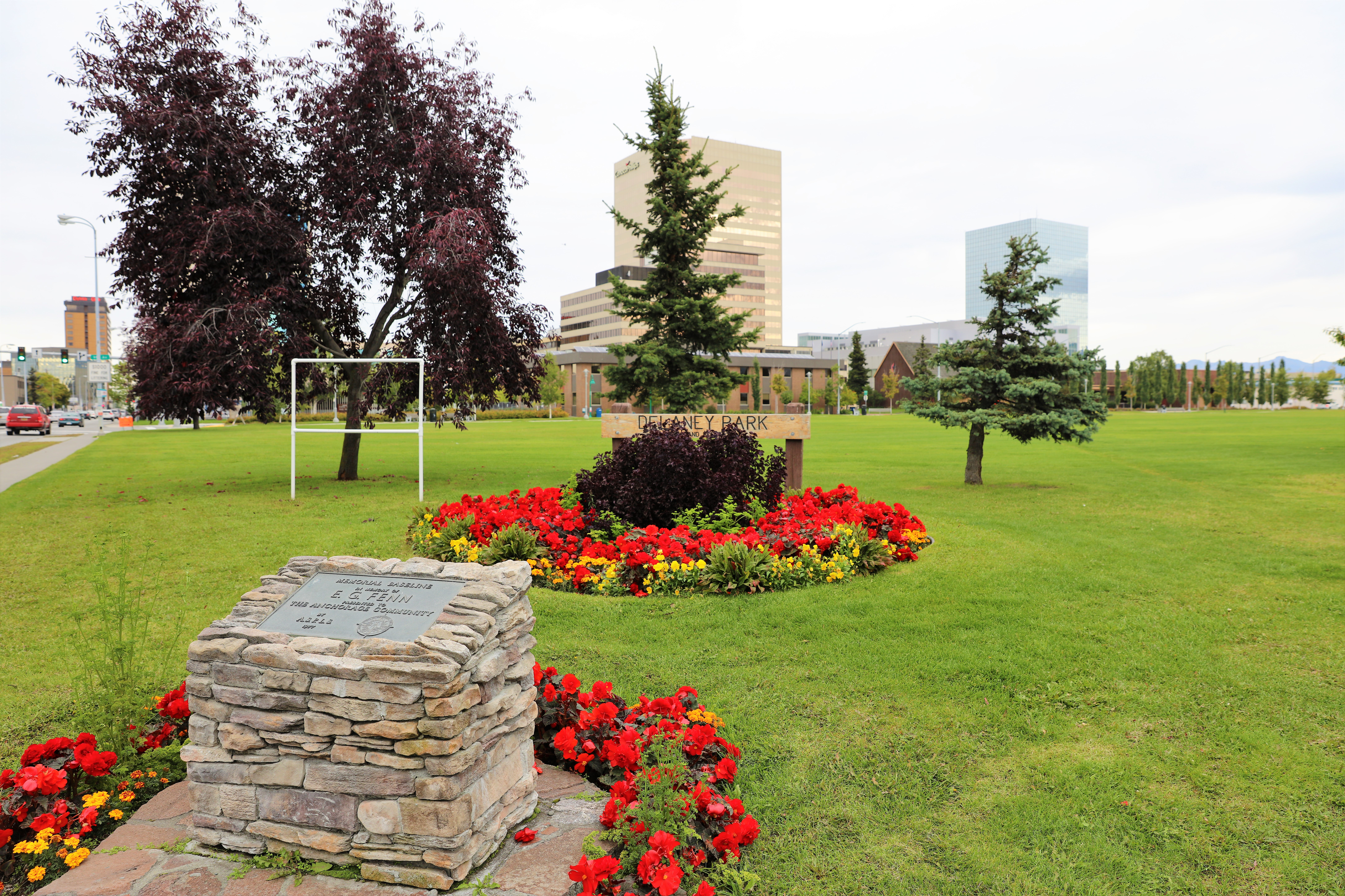 Il parco in settembre